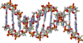 Hélice d'ADN